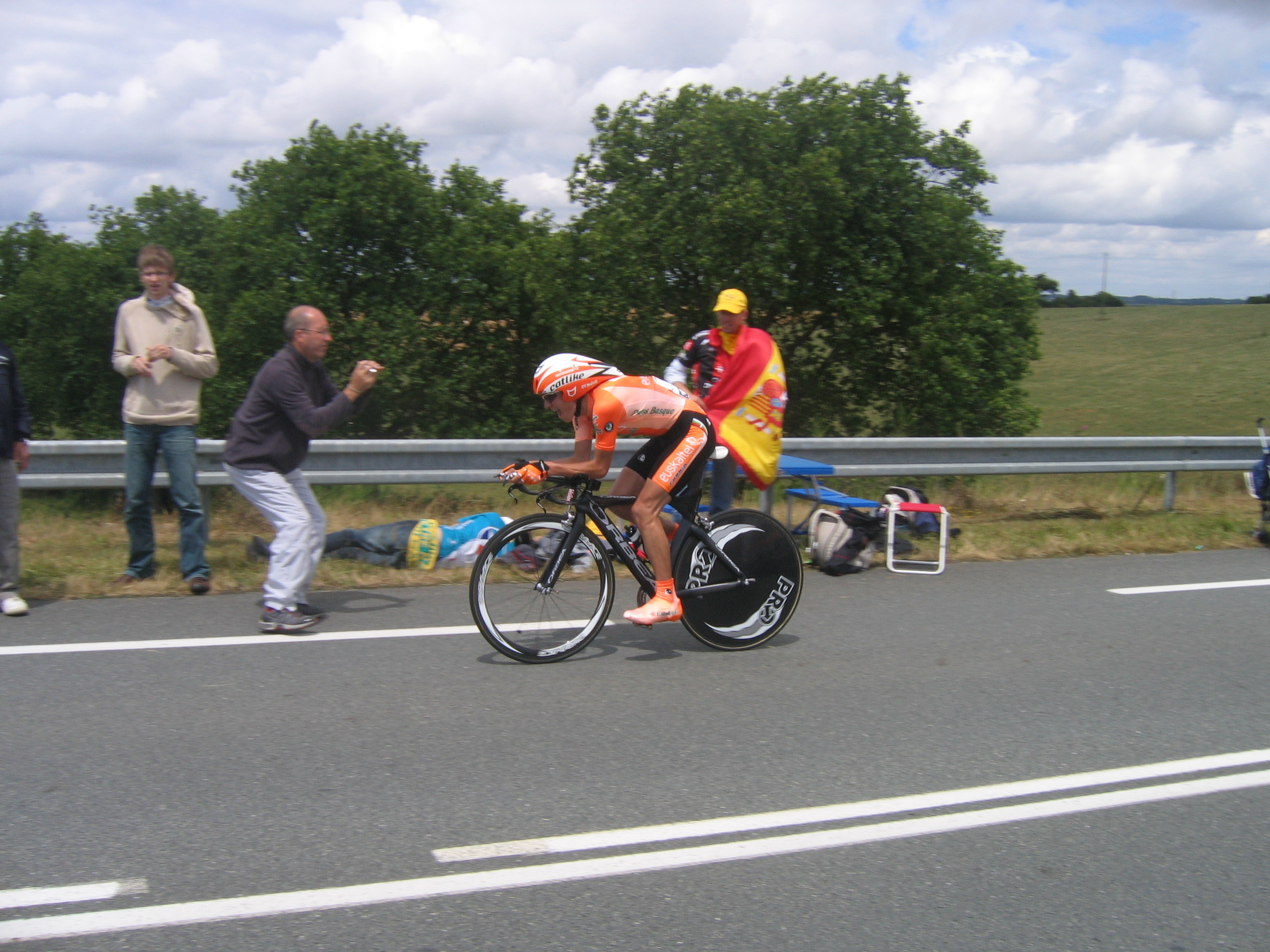 Amets Txurruka lors de la 4eme étape du Tour de France 2008